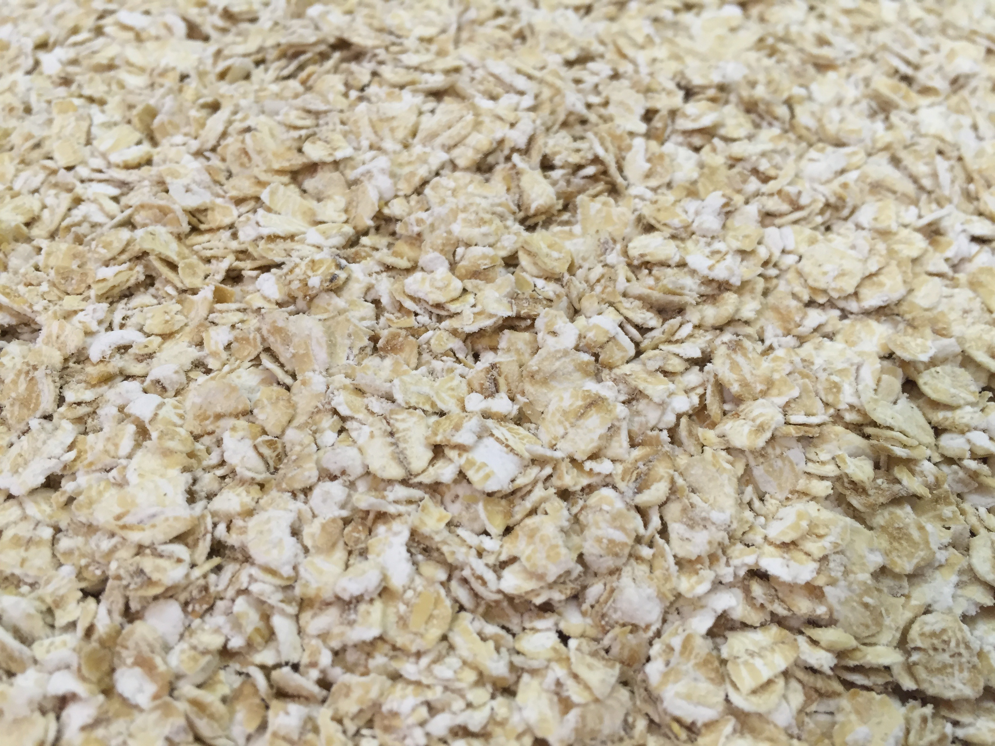 גרעיני שיבולת שועל שאודו, שוטחו, בושלו/אודו עוד, עובדו לצורת שבבים ויובשו